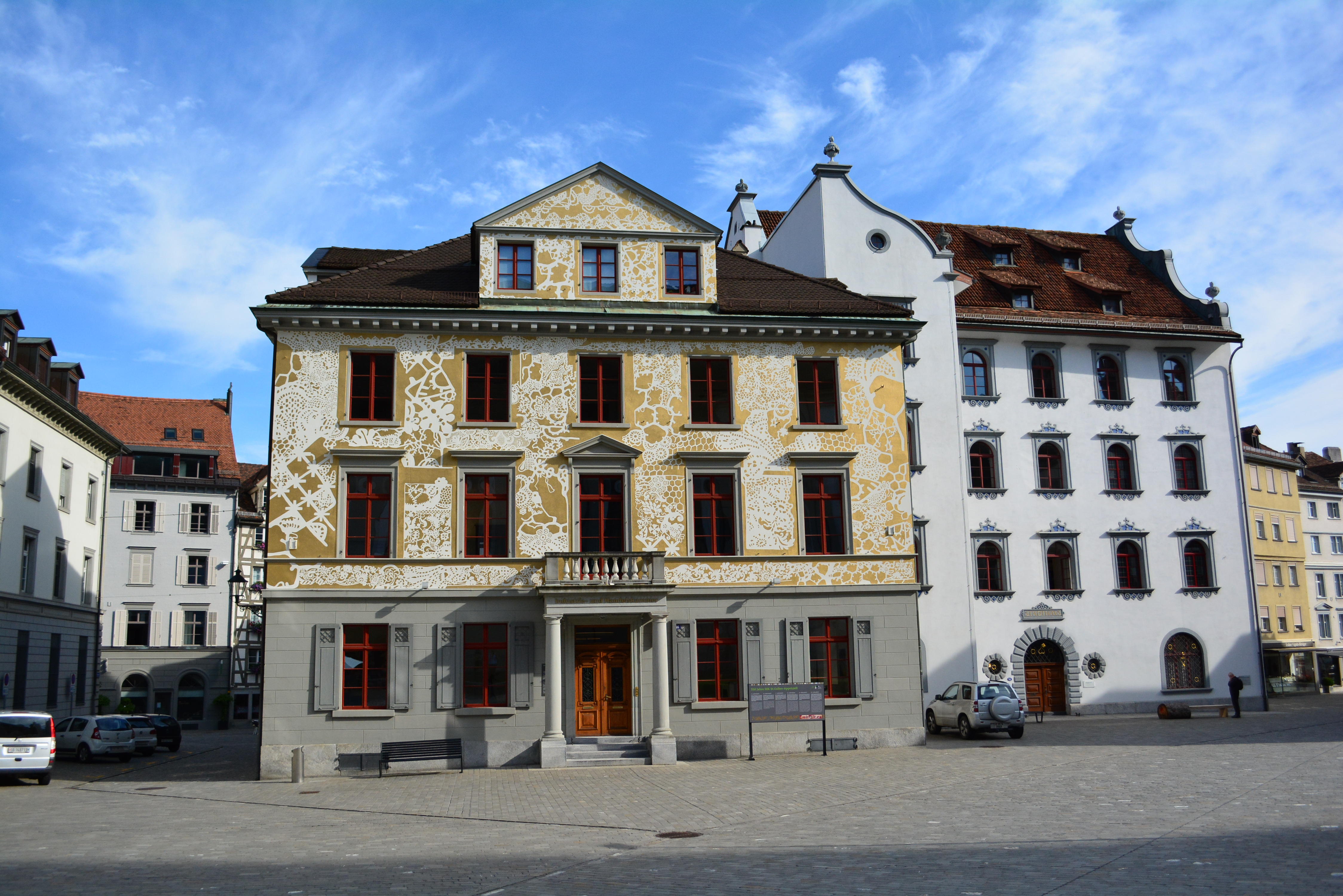 Zum 550-Jahr-Jubiläum wurde dem Sitz der IHK St.Gallen-Appenzell 2016 ein goldendes Festkleid mit Stickereimuster verpasst.